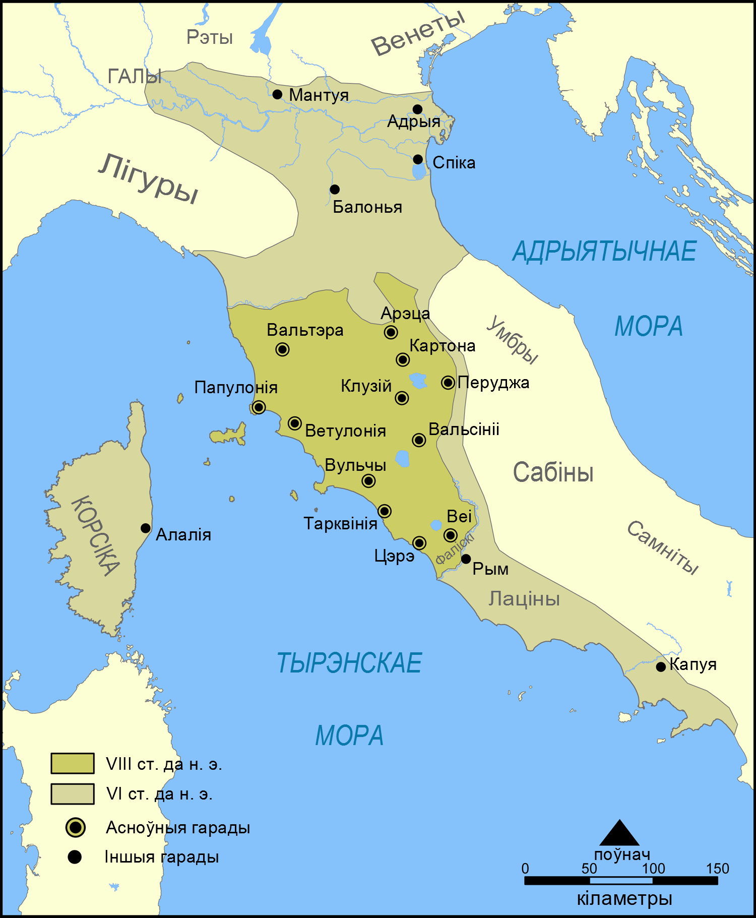 Карта паказвае абрысы Этрурыі і этрускай цывілізацыі. Яна ўключае 12 асноўных гарадоў этрускай лігі і іншыя горады, заснаваныя этрускамі.